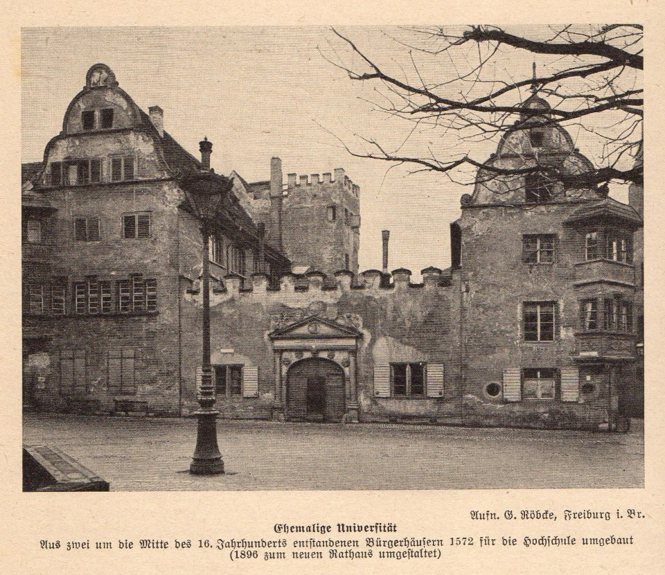 Ehemalige Universität vor dem Umbau zum Neuen Rathaus